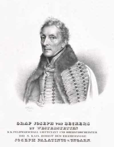 Graf Joseph Heinrich Beckers zu Westerstetten, österreichischer Feldmarschall-Leutnant (1764-1840)